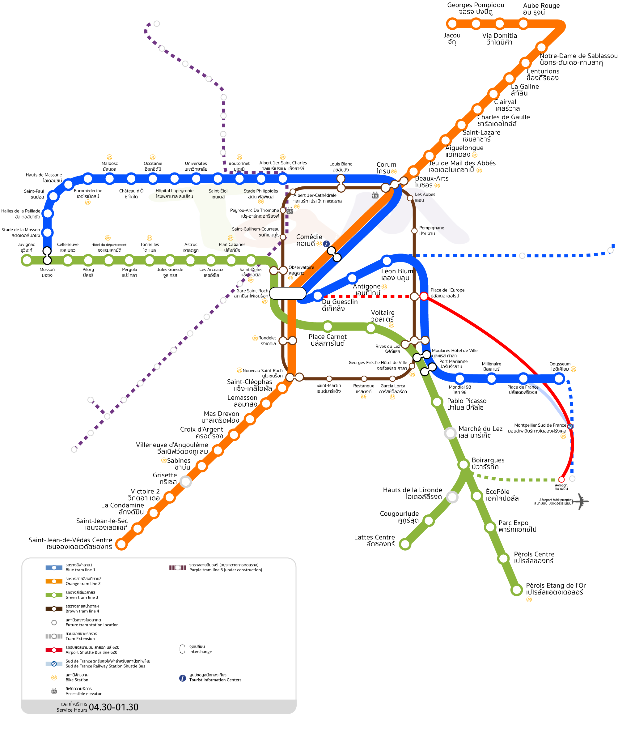 Plan du tramway de Montpellier 2019